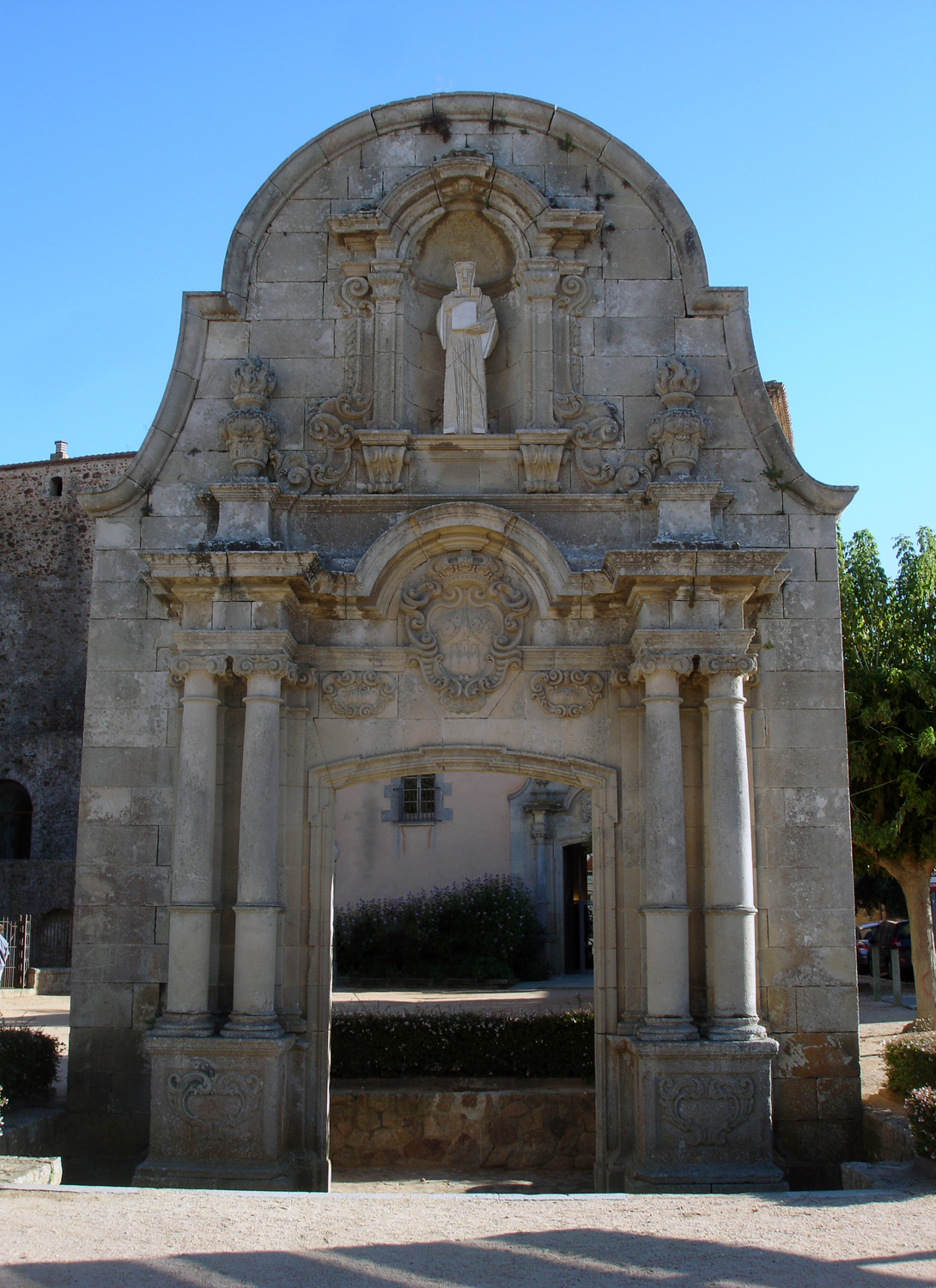 Monestir de Sant Feliu de Guíxols - "Arc de Sant Benet" (Girona, Catalunya, Espanya)